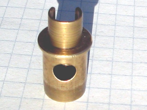 Ugello erogatore per carburatori motociclistici e emulsionatori a due tempi